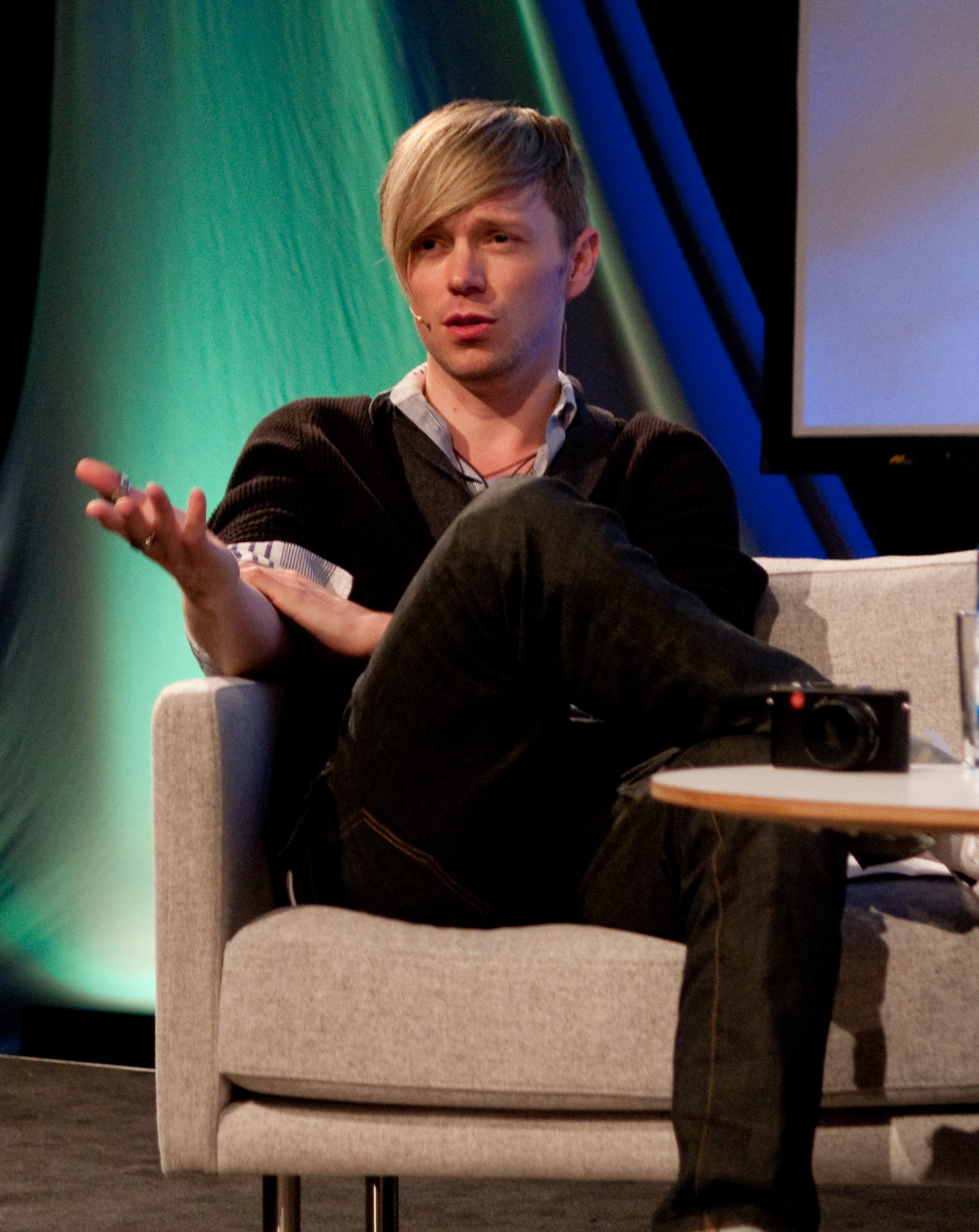 Ray Kay